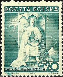 Polska.1938. Zn.nr. Fi.313. Król Kazimierz Jagiellończyk